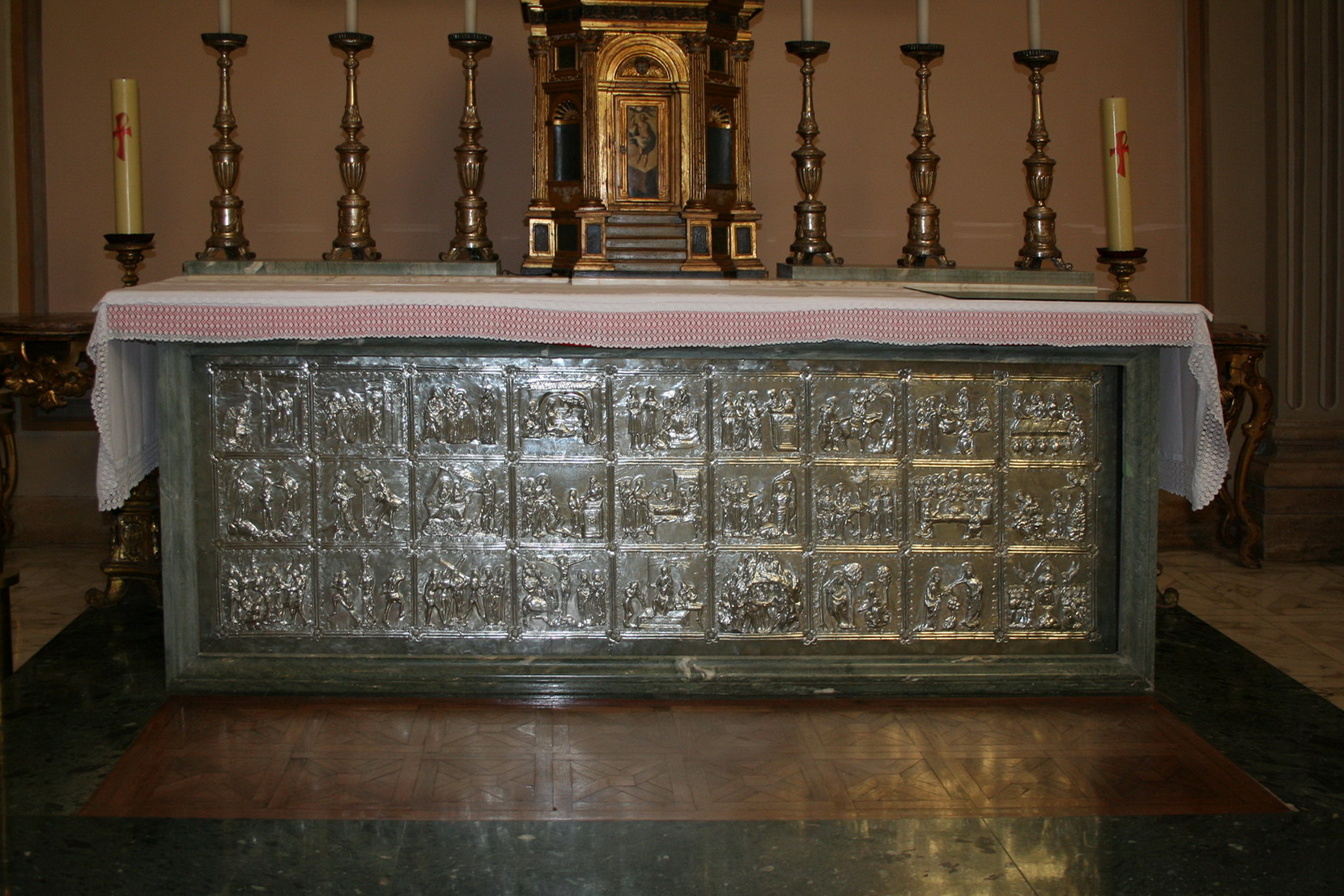 Altare interno della Cappella del Sacramento della Cattedrale di Sant'Emidio di Ascoli Piceno.